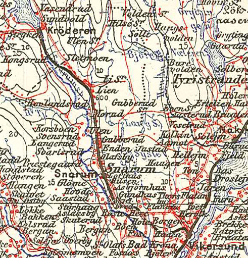 Kart over Krøderbanen